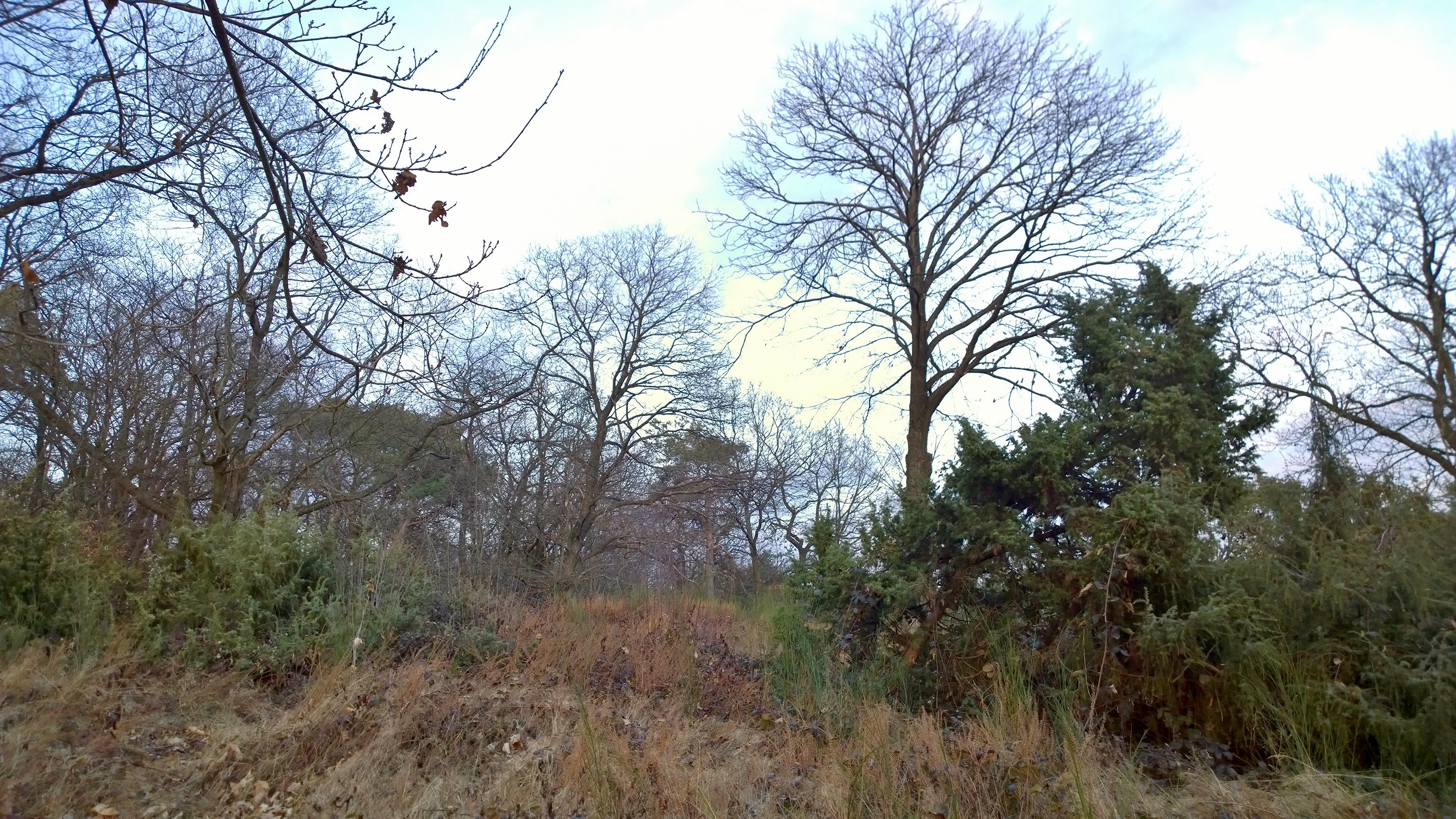 Kleinwald aus Akazien, Esskastanien, Wacholder und Linden; vom Weingebiet Einzellage "Am Herrnberg" und dem Umstädter Weinlehrpfad umgeben.